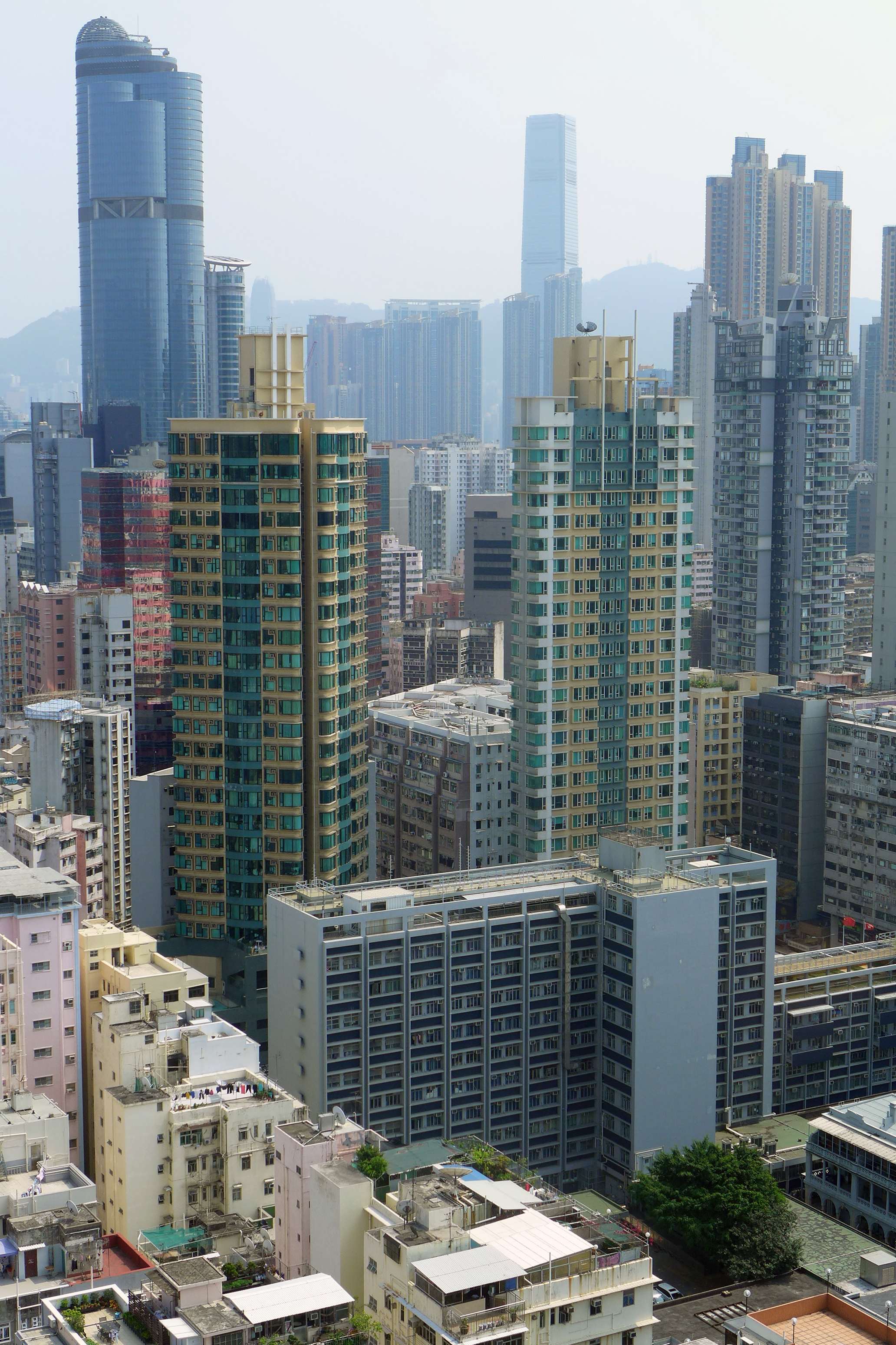 Bijou Court